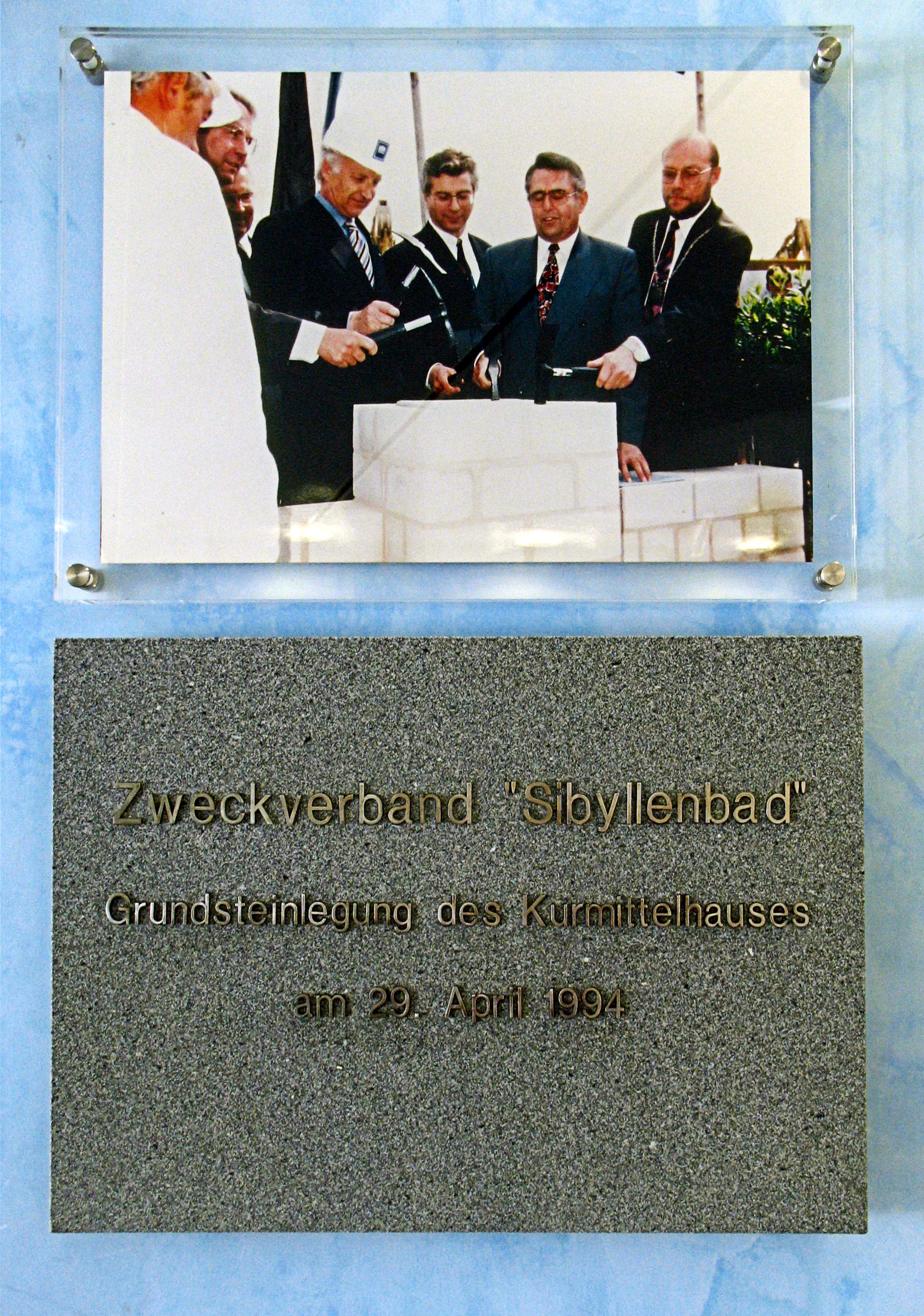 Gedenkplatte im Untergeschoß des Sibyllenbads zur Grundsteinlegung im Jahr 1994 (Neualbenreuth in der Oberpfalz)